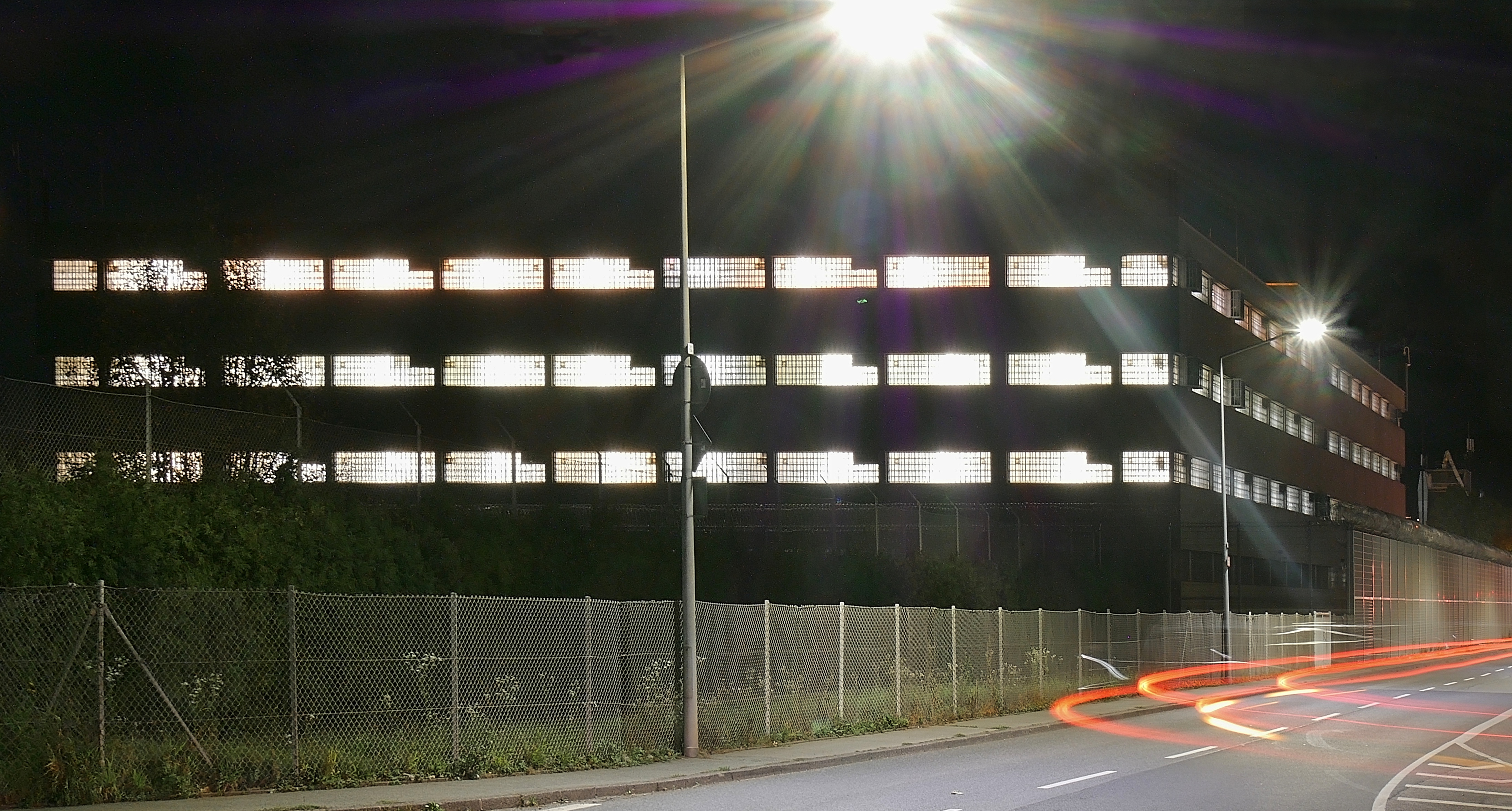 JVA Trier in der Gottbillstraße